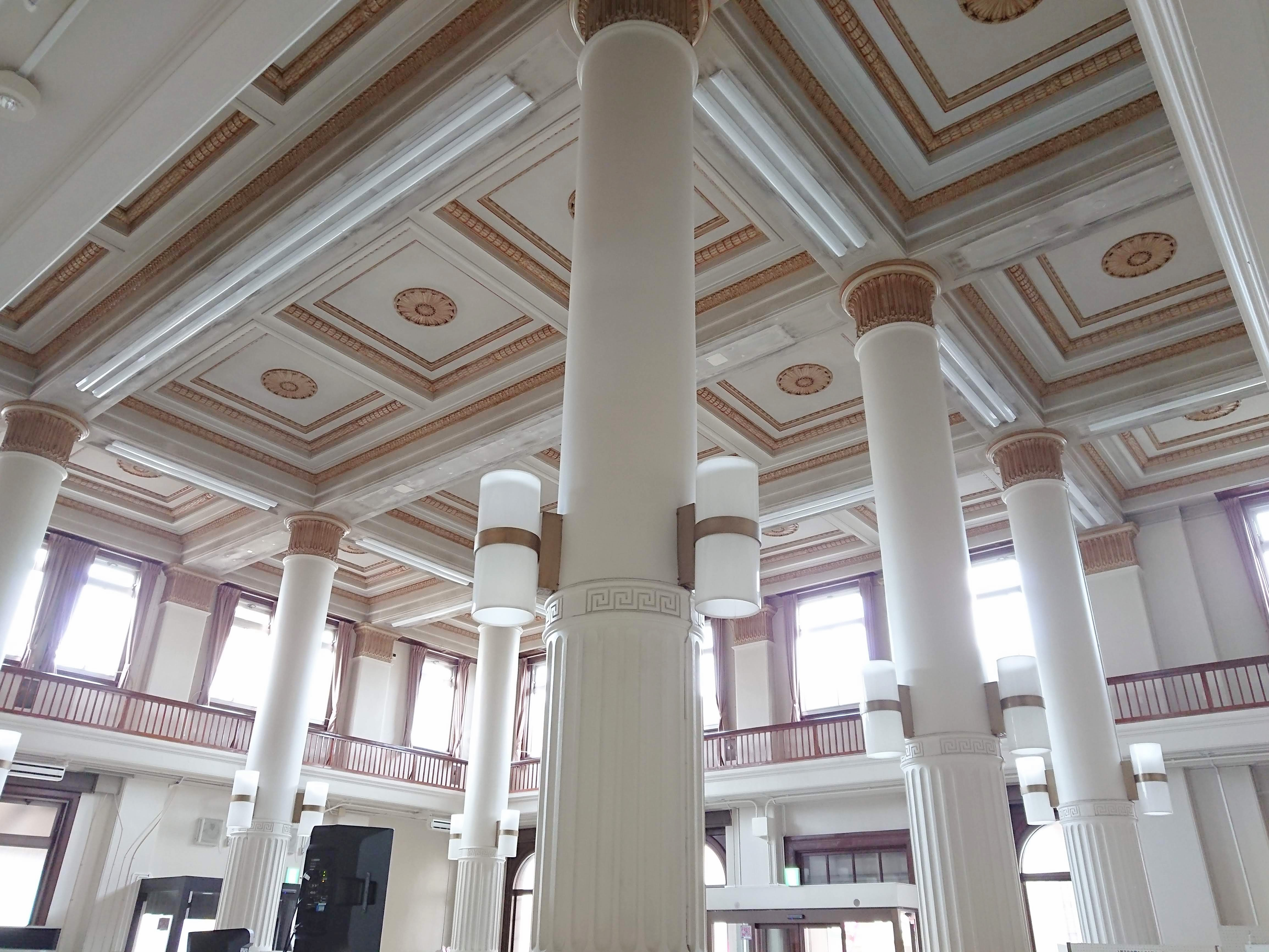 第四銀行（旧）高田支店の館内